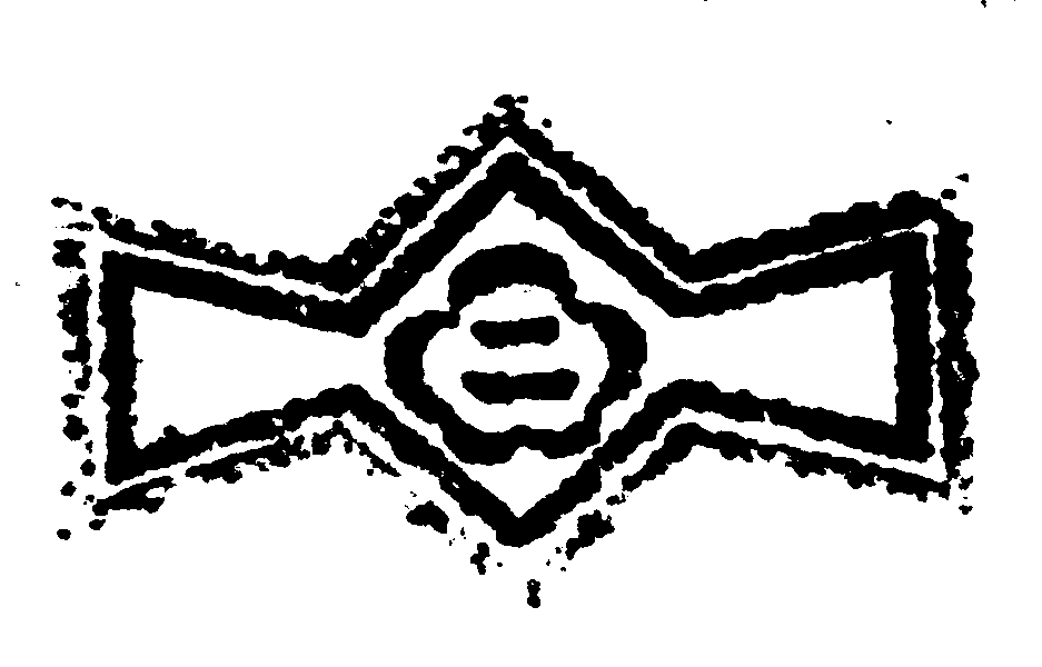 カナリーヤシが基になっている